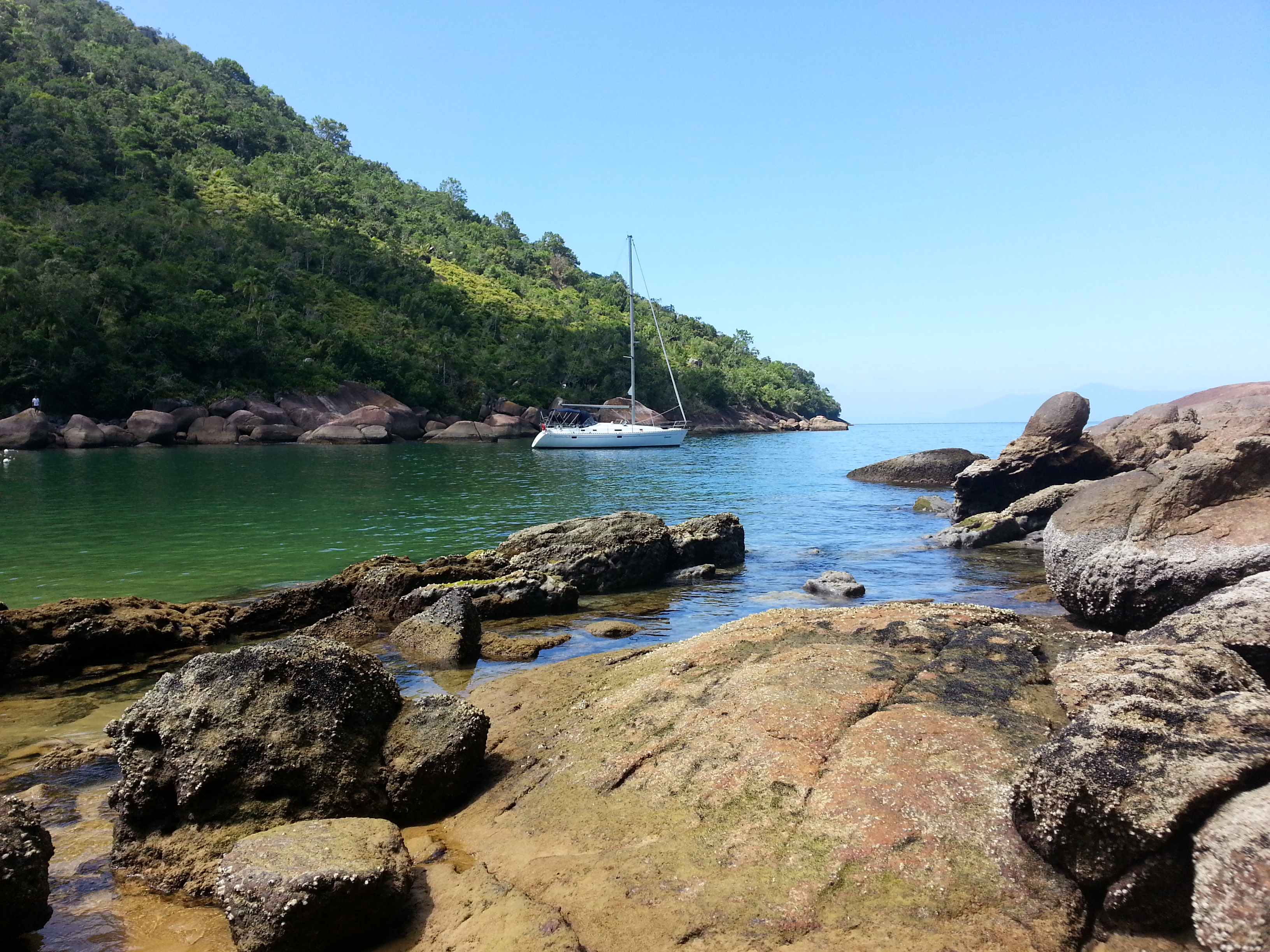 Anchieta Island State Park - South Beach